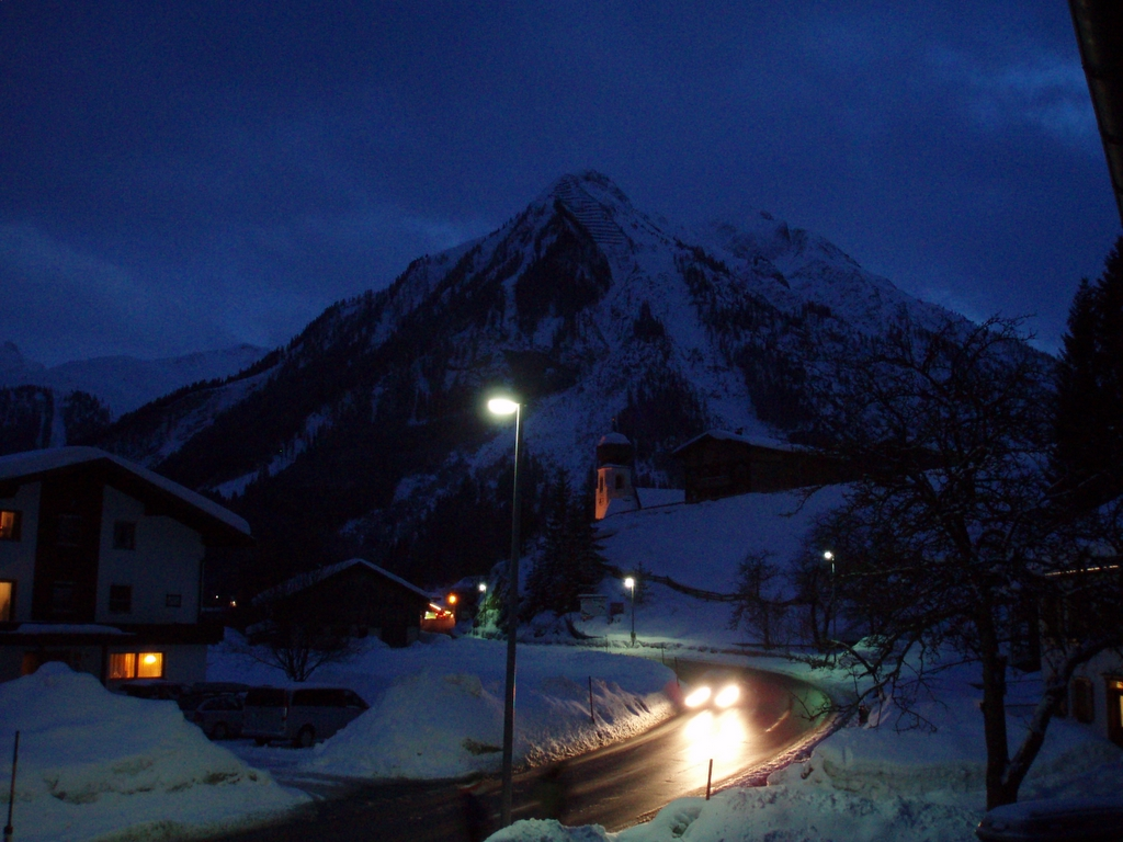 Das Lichtbild zeigt die Kirche in Bach (Lechtal) vor dem Sonnenkogel.